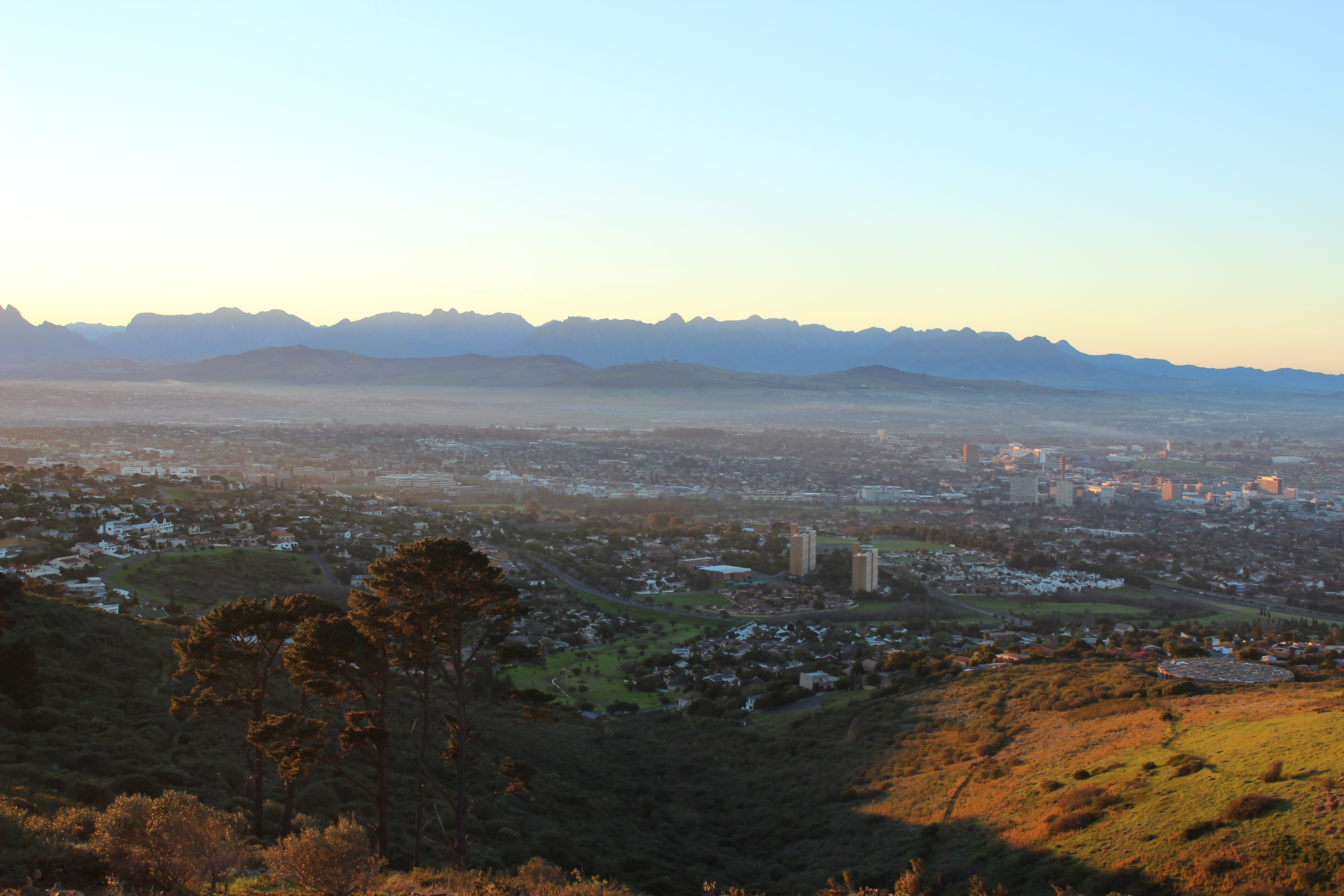 Looking towards Paarl from Tygerberg Hill